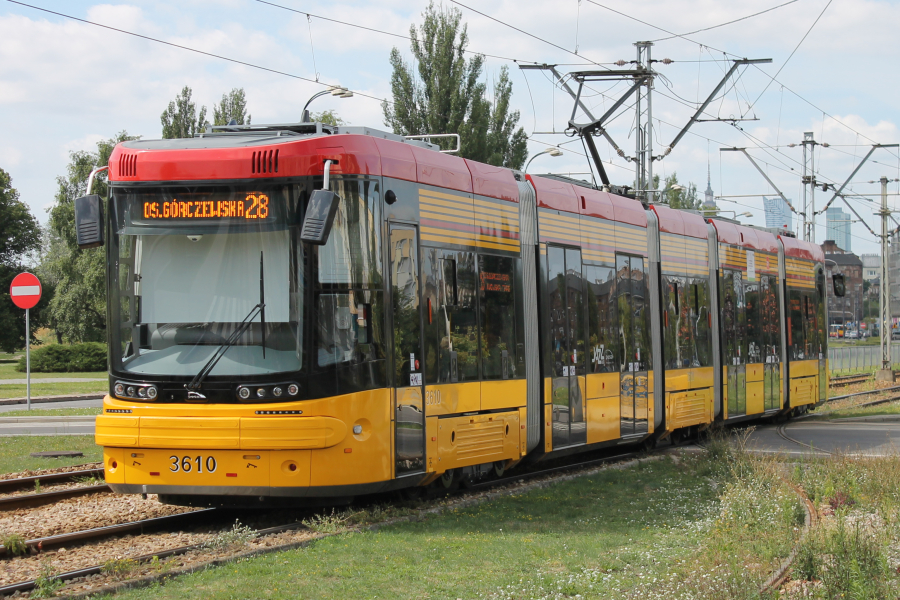 Tramwaj Pesa Jazz Duo 128N #3610 odjeżdża z pętli Dworzec Wschodni /Kijowska/.